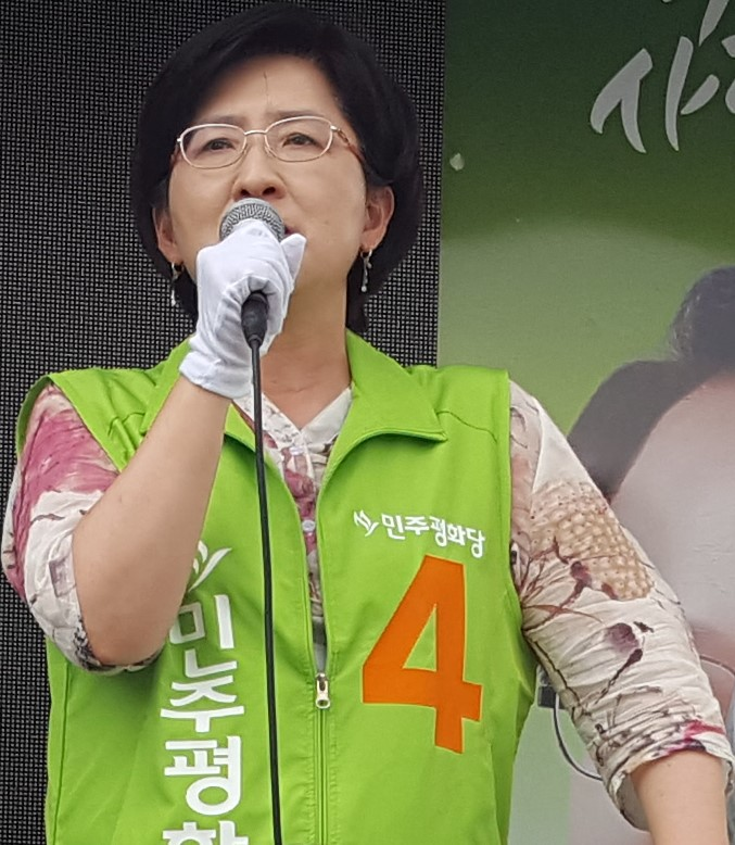 전라북도 익산시 남중동 북부시장사거리에서 바른미래당 박주현 의원이 임정엽 전북도지사 후보, 정헌율 익산시장 후보 그리고 도, 시의원 후보의 지지를 호소하는 연설을 하고 있다.